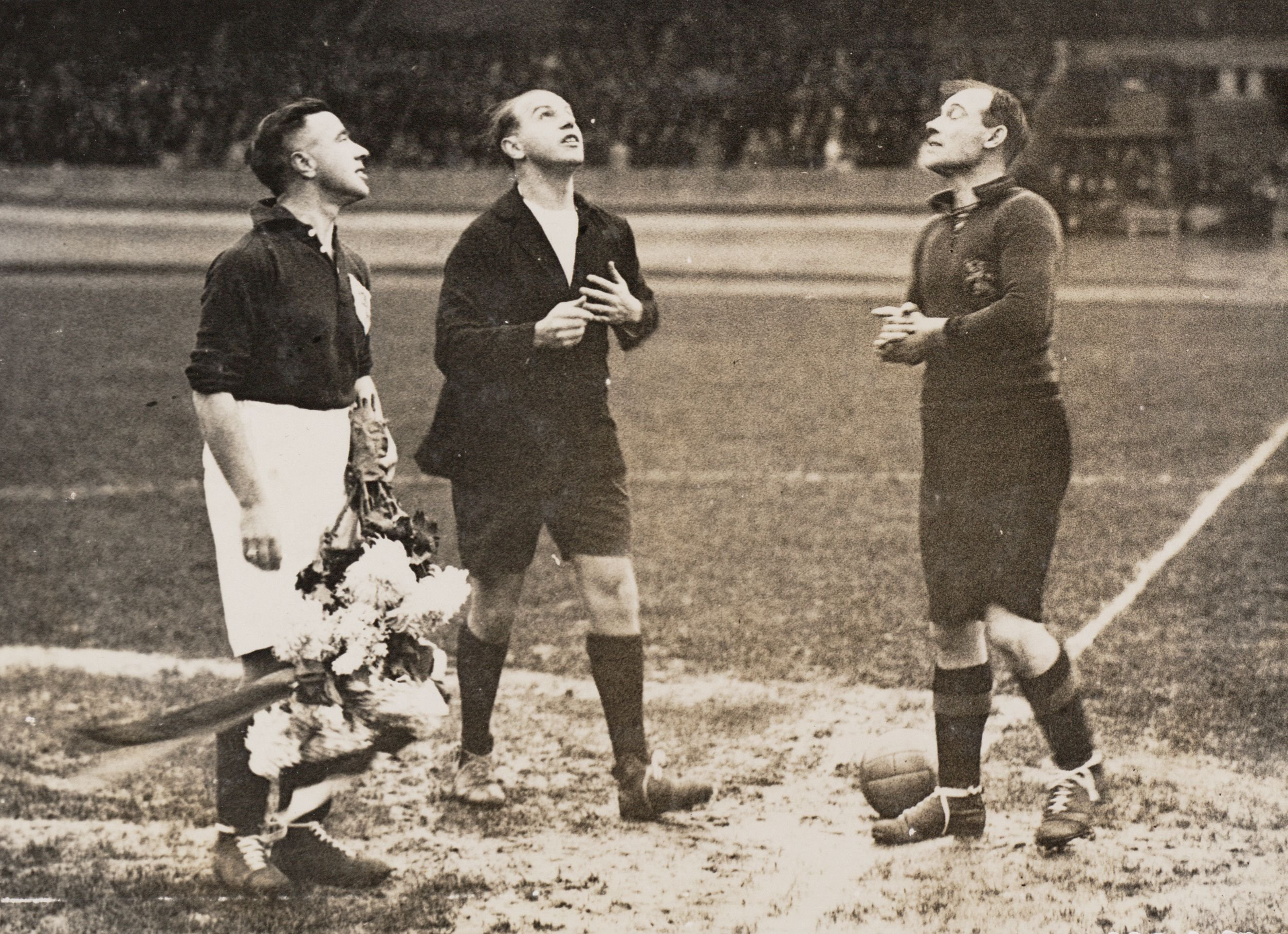 Aanvoerder Henk Vermetten, de Zwitserse scheidsrechter Ruoff en de Belgische aanvoerder bij de toss. Nederland - België (1-0), gespeeld op 8 december 1929 in het Olympisch Stadion te Amsterdam.